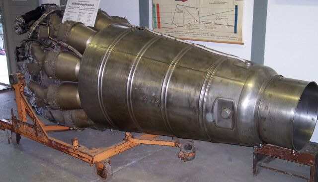 Strahltriebwerk der 50er Jahre